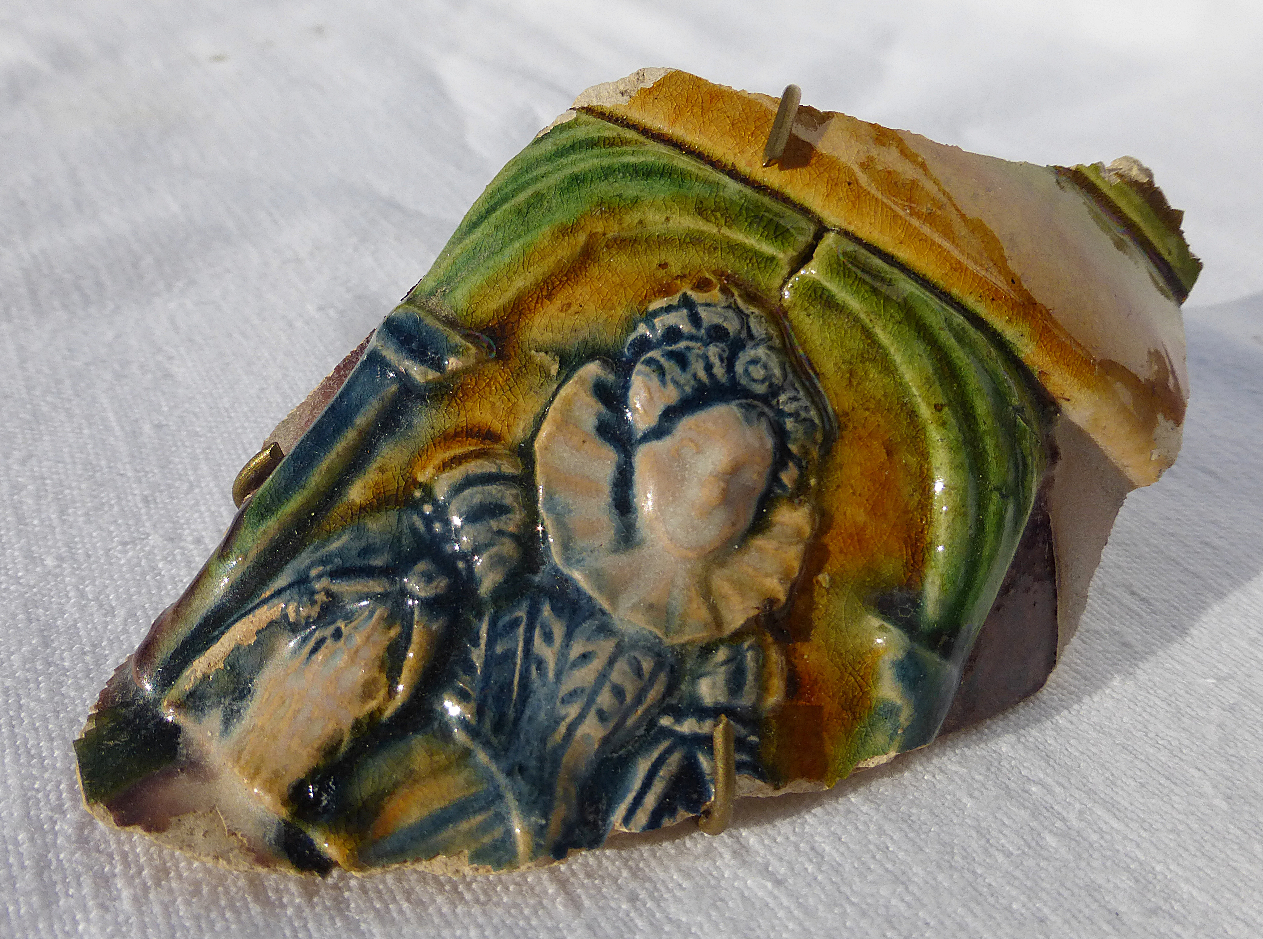 Glasierte Tonscherbe mit adeliger Frau aus Gschaid